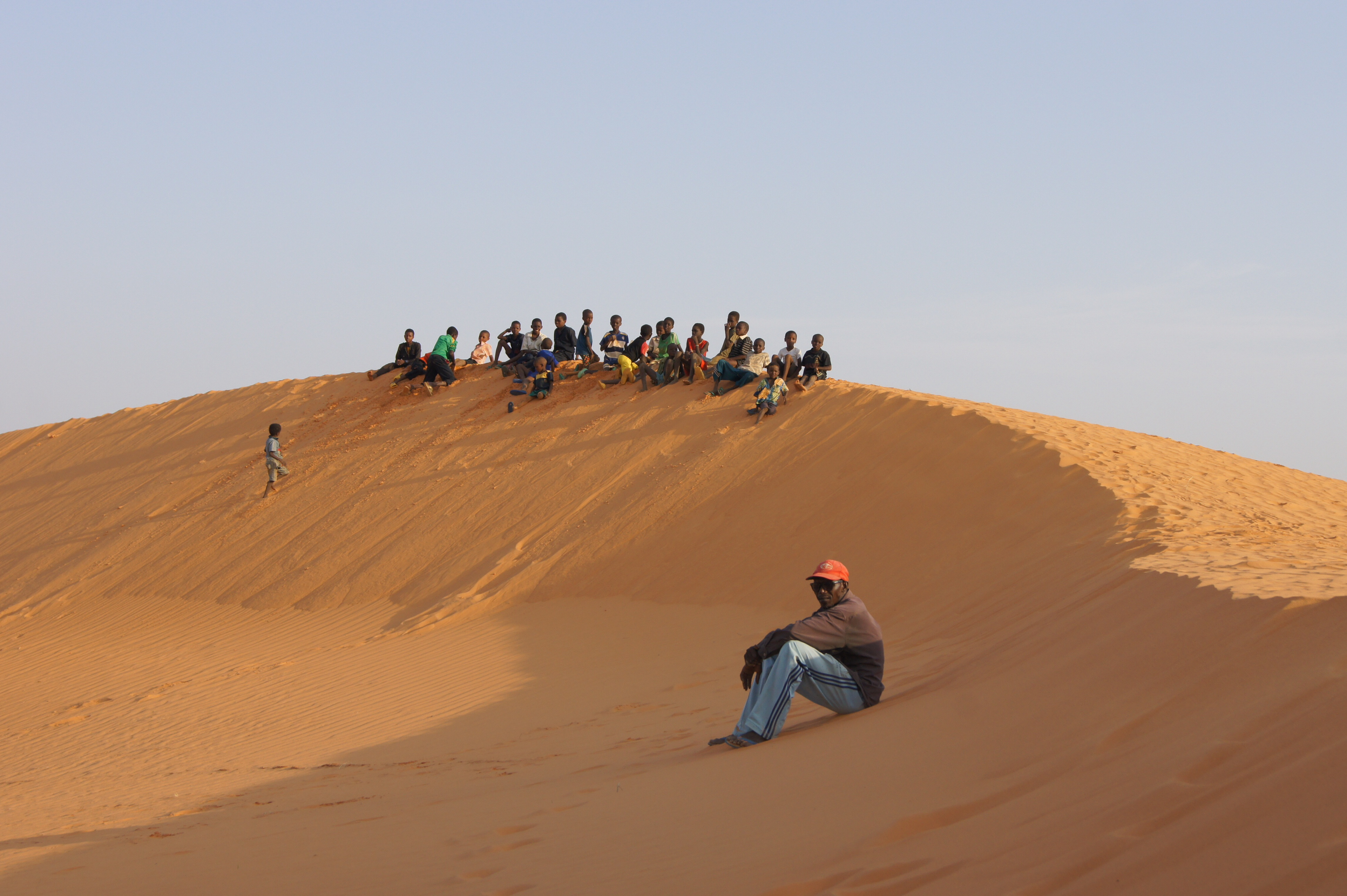 Gardien officiel des dunes, garant de la bonne tenue du site, aux environs de Niamey This is an image of "African people at work" from Niger